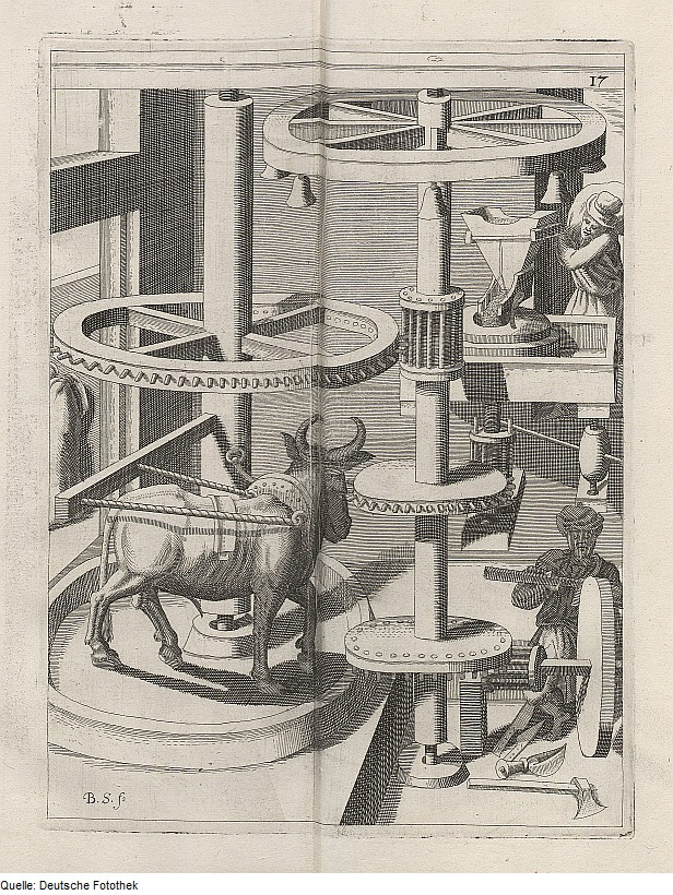 Original image description from the Deutsche Fotothek Mühle & Ochse